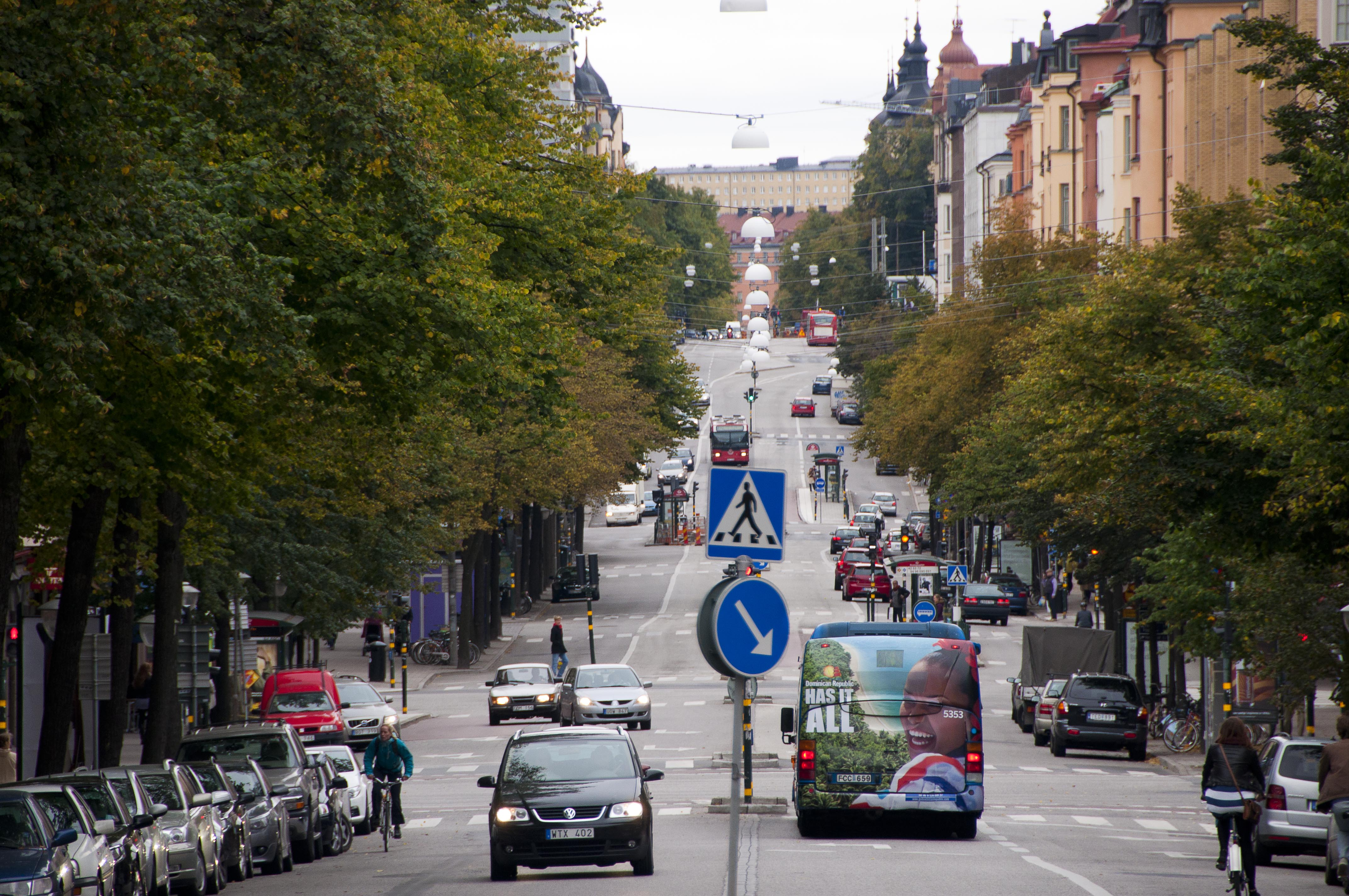 Odengatan väster ut, från Verdandigatan